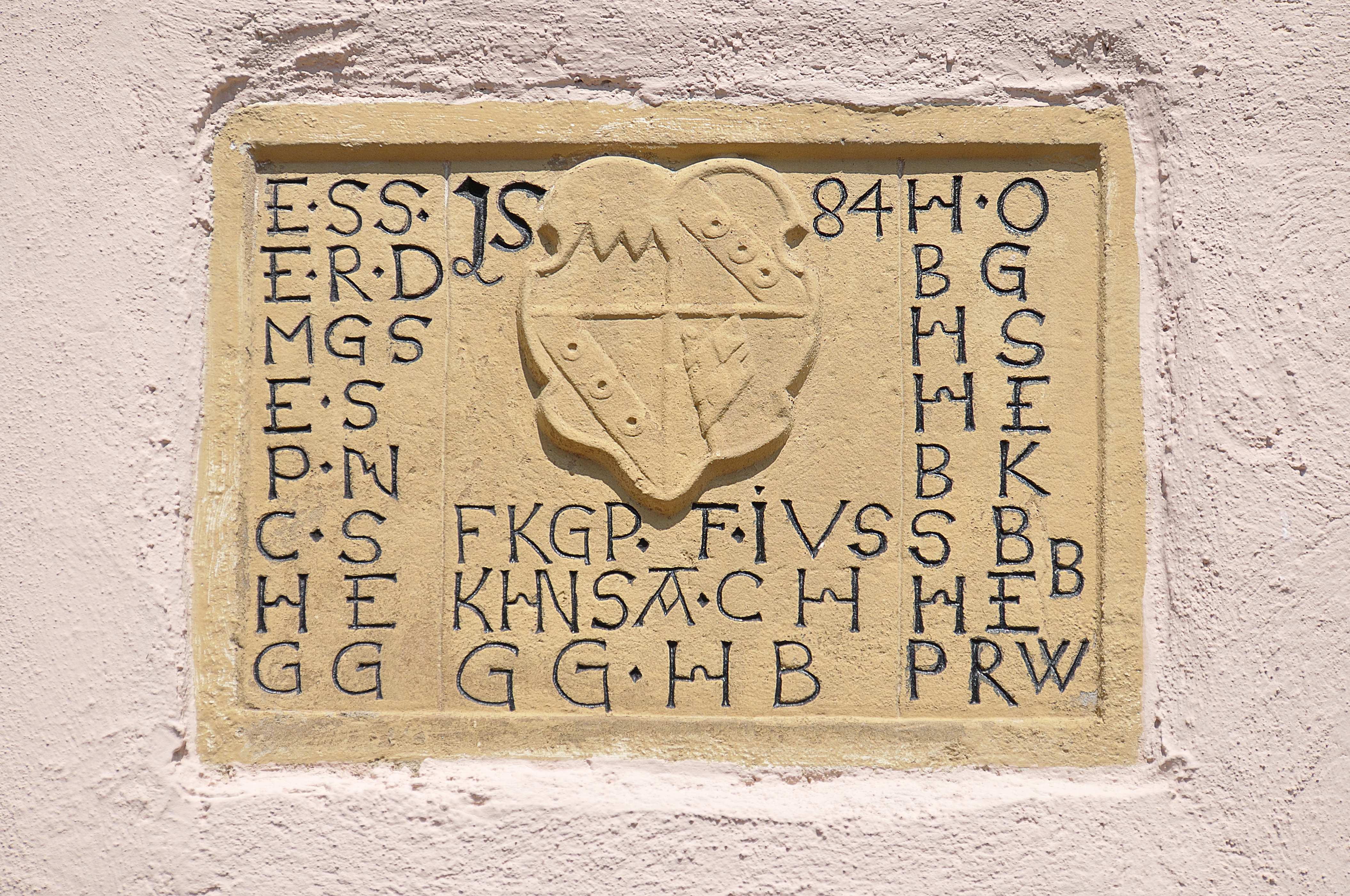 Wappen am ehemaligen Rathaus von Wülfershausen kurz nach der Renovierung 2009